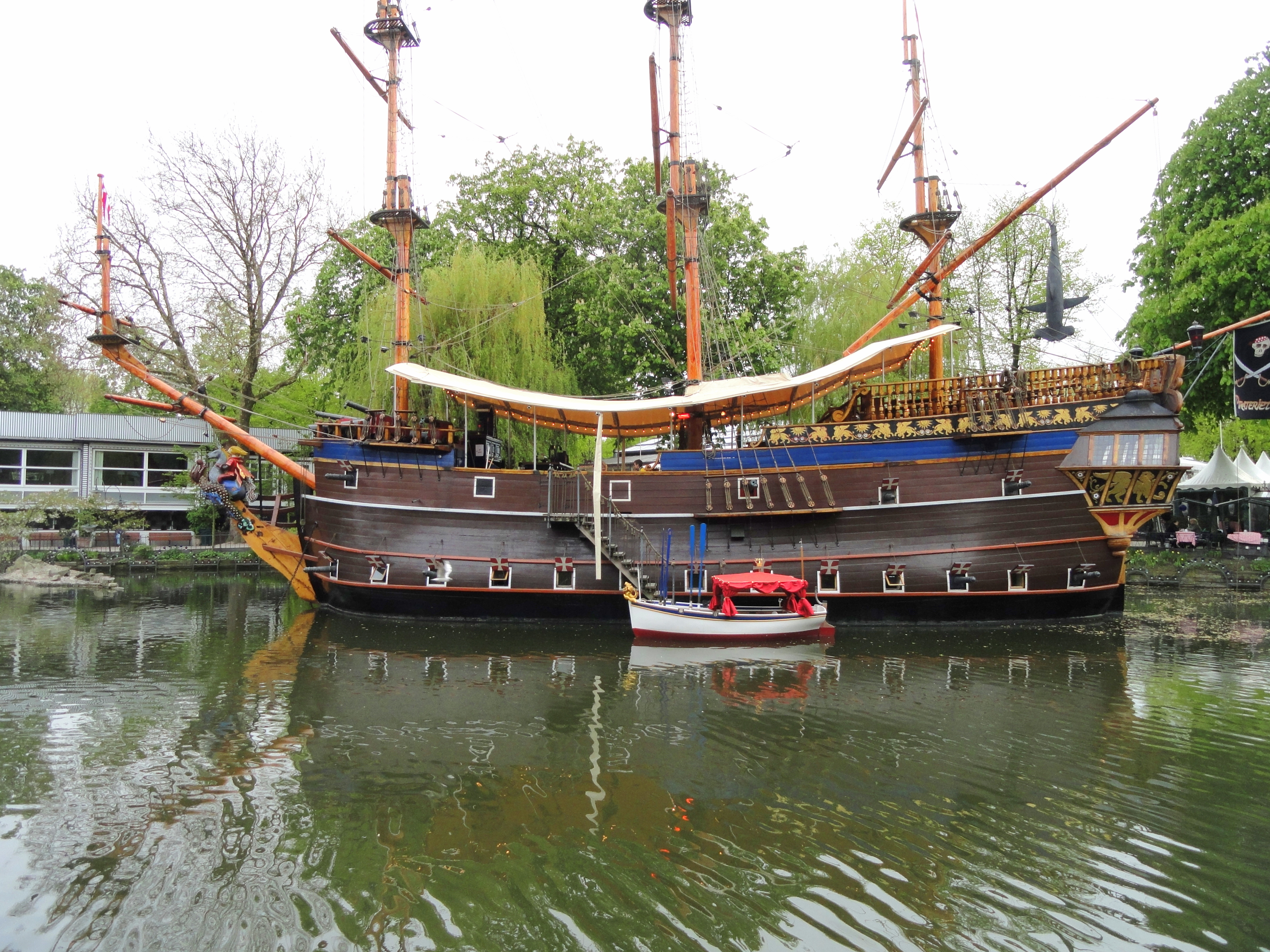 Tivoli Gardens, Copenhagen, Denmark.